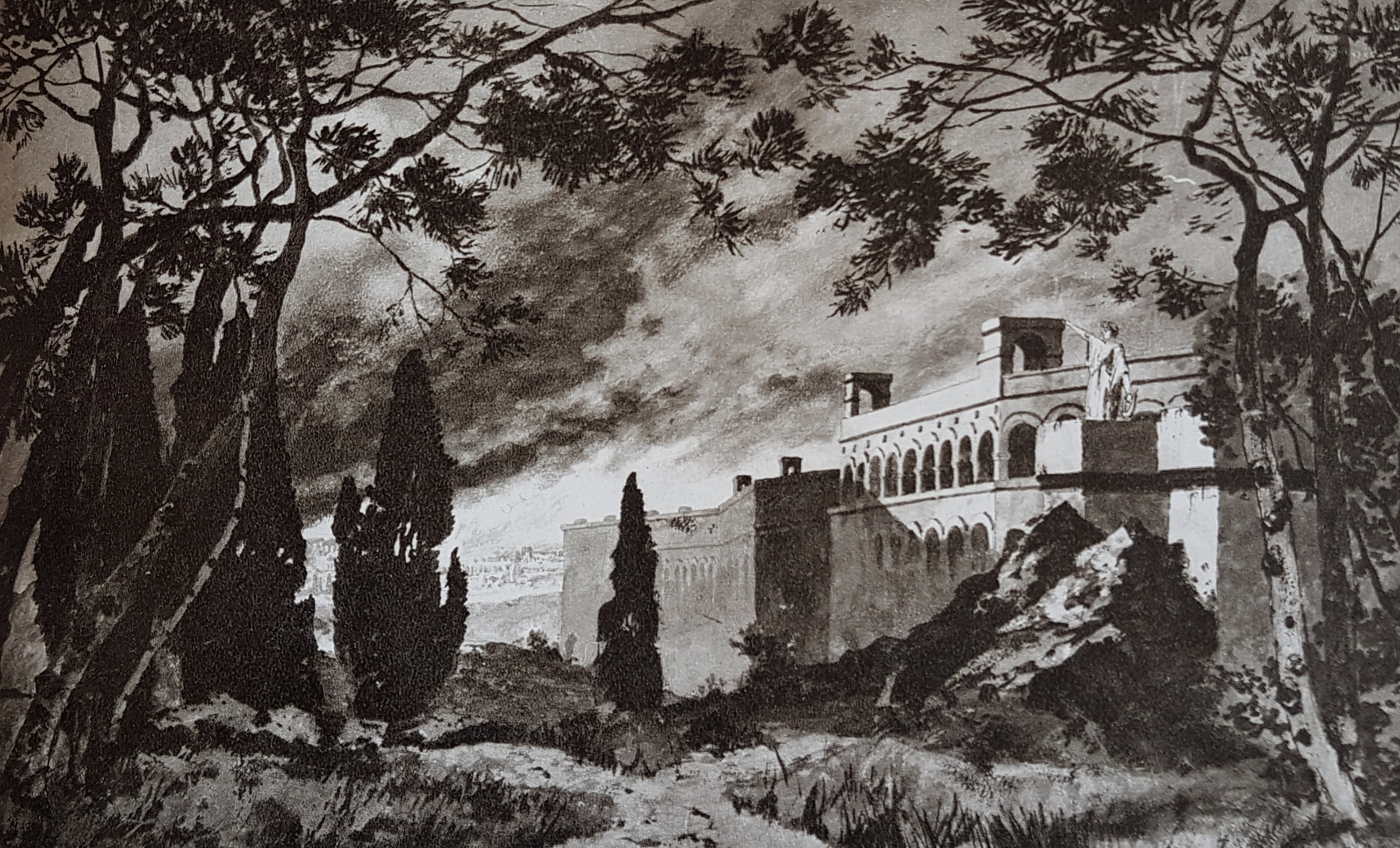 Skiss för Quo Vadis dekoration vid finska teatern i Helsingfors utförd av Carl Ludwig Grabow, avfotograferad bild från Allhems Svenskt konstnärslexikon.